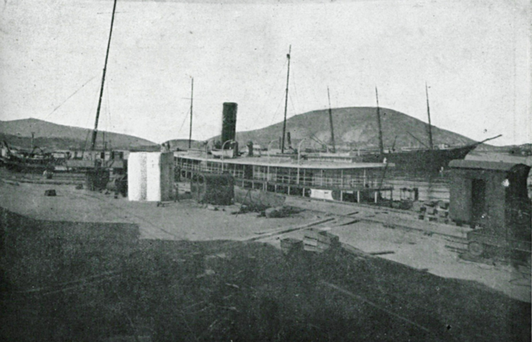 Legenda original: "O «Biguá», bello vapor encarregado do transporte dos empregados para a Ilha do Vianna, atracado no citado cáes".